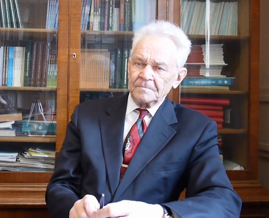 Фотография Ю. А. Золотова